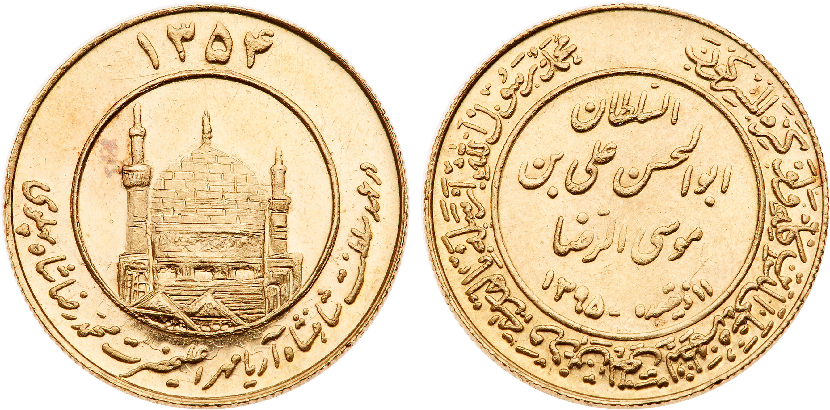 سکه یادبود محمدرضا پهلوی برای تکریم مقام علی بن موسی